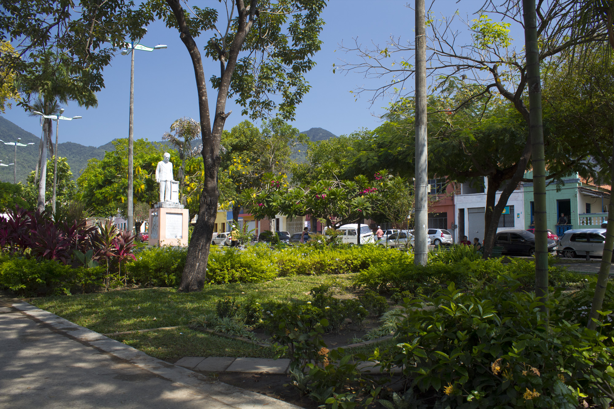 No mês de setembro, o céu azul e a alta luminosidade dos dias deixam as cores da Praça Capistrano de Abreu excepcionalmente vívidas.